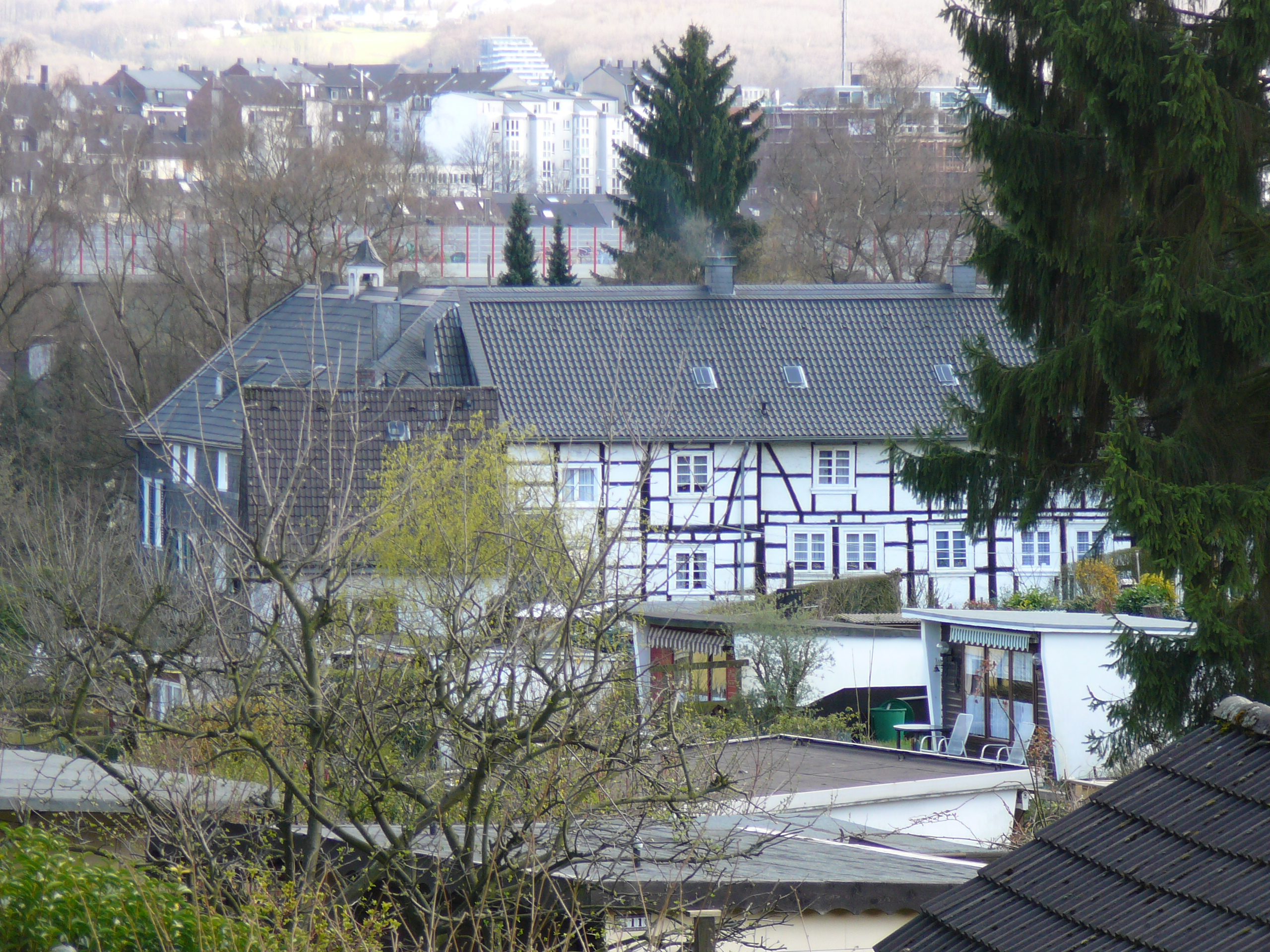 In der Mirke, Wuppertal